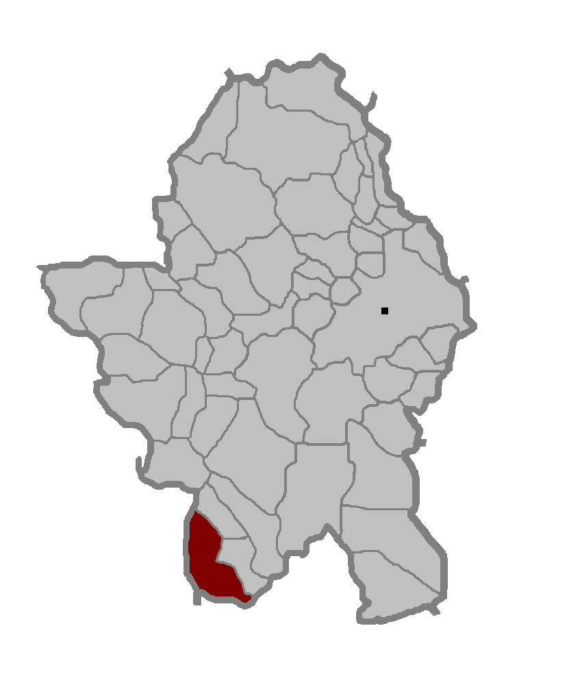 Насељено мјесто Дујаковци